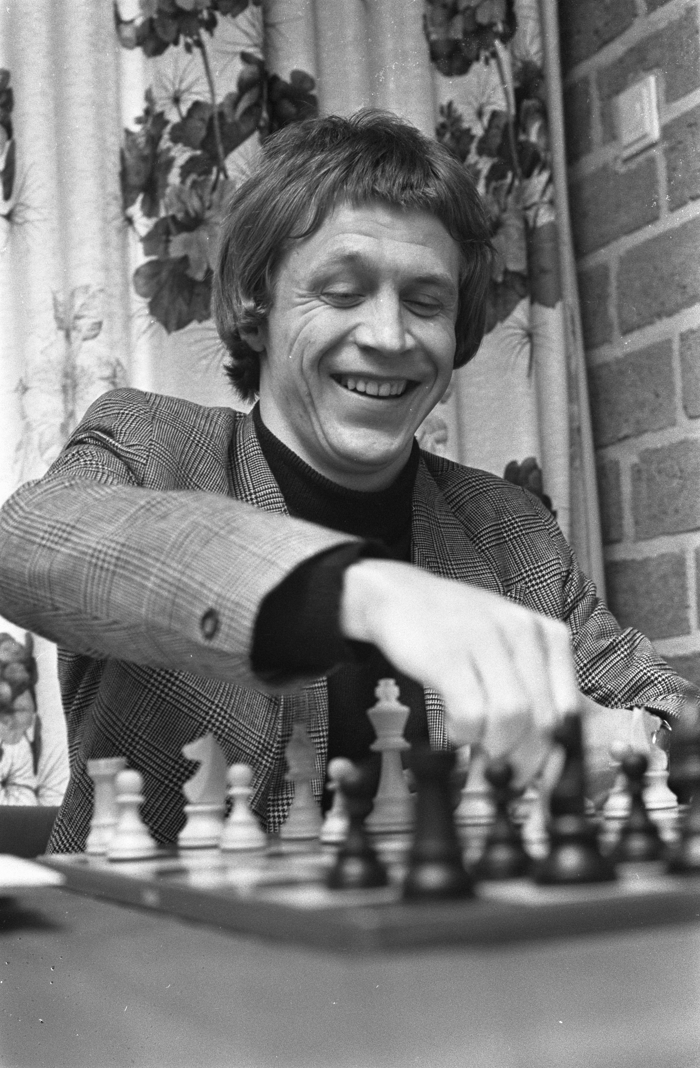 Collectie / Archief : Fotocollectie Anefo Reportage / Serie : [ onbekend ] Beschrijving : Hoogovenschaaktoernooi, Andorjan (Hongarije) Datum : 11 januari 1972 Locatie : Hongarije Trefwoorden : schaken Instellingsnaam : Hoogovenschaaktournooi Fotograaf : Verhoeff, Bert / Anefo Auteursrechthebbende : Nationaal Archief Materiaalsoort : Negatief (zwart/wit) Nummer archiefinventaris : bekijk toegang 2.24.01.05 Bestanddeelnummer : 925-3011